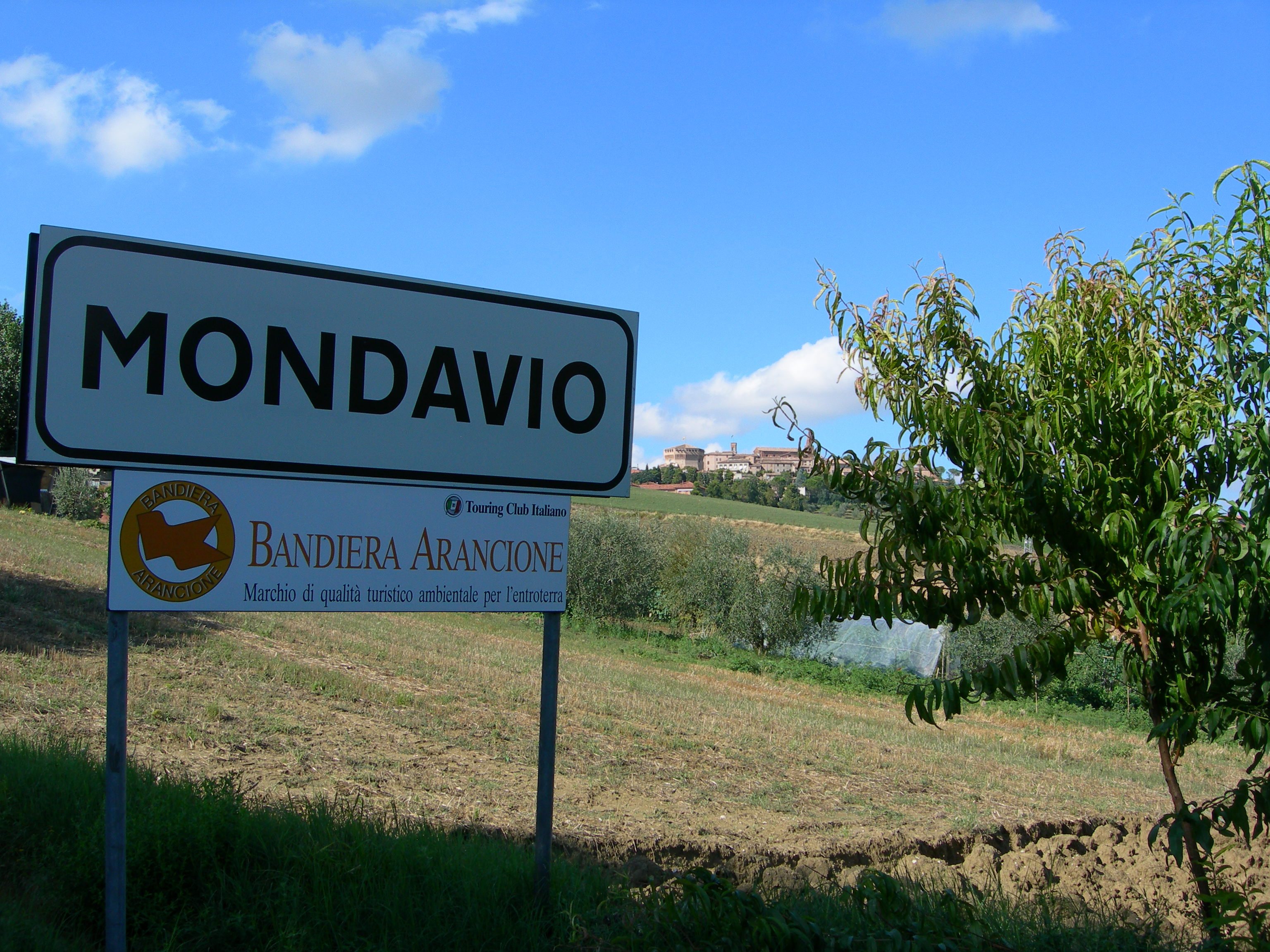 Veduta di Mondavio